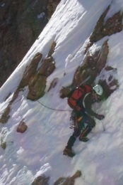 Escalada hivernal al Pirineu